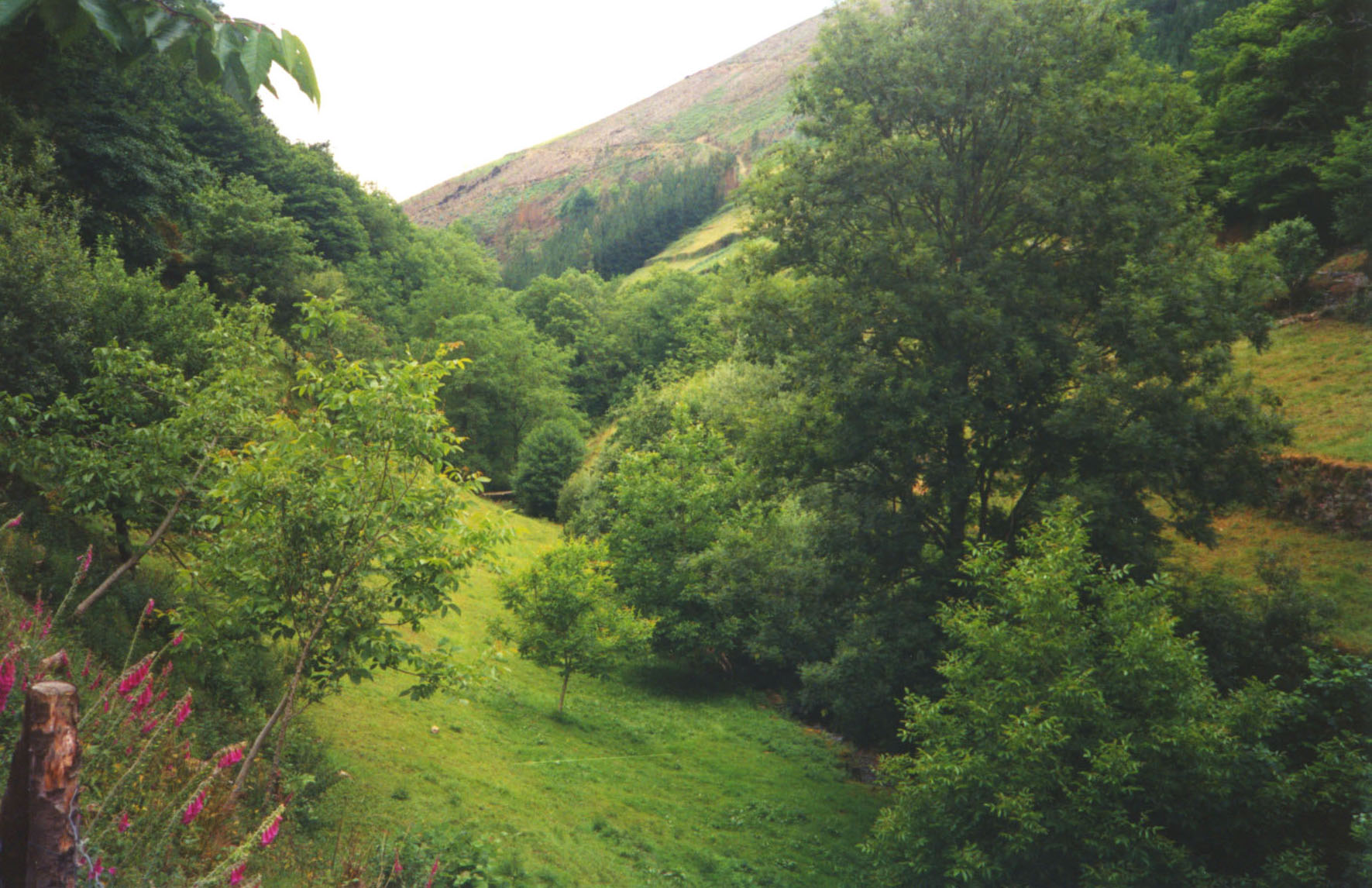 Taramundi (Asturias, España);fotografía en papel